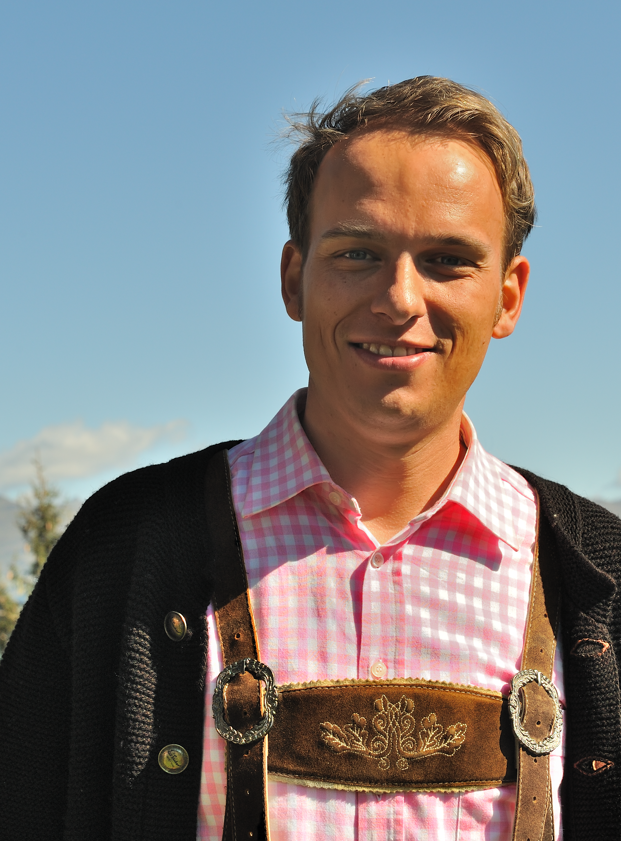 Der Abgeordnete zum Südtiroler Landtag Sven Knoll (Süd-Tiroler Freiheit) am 06.09.09 auf der Brunner Mahder